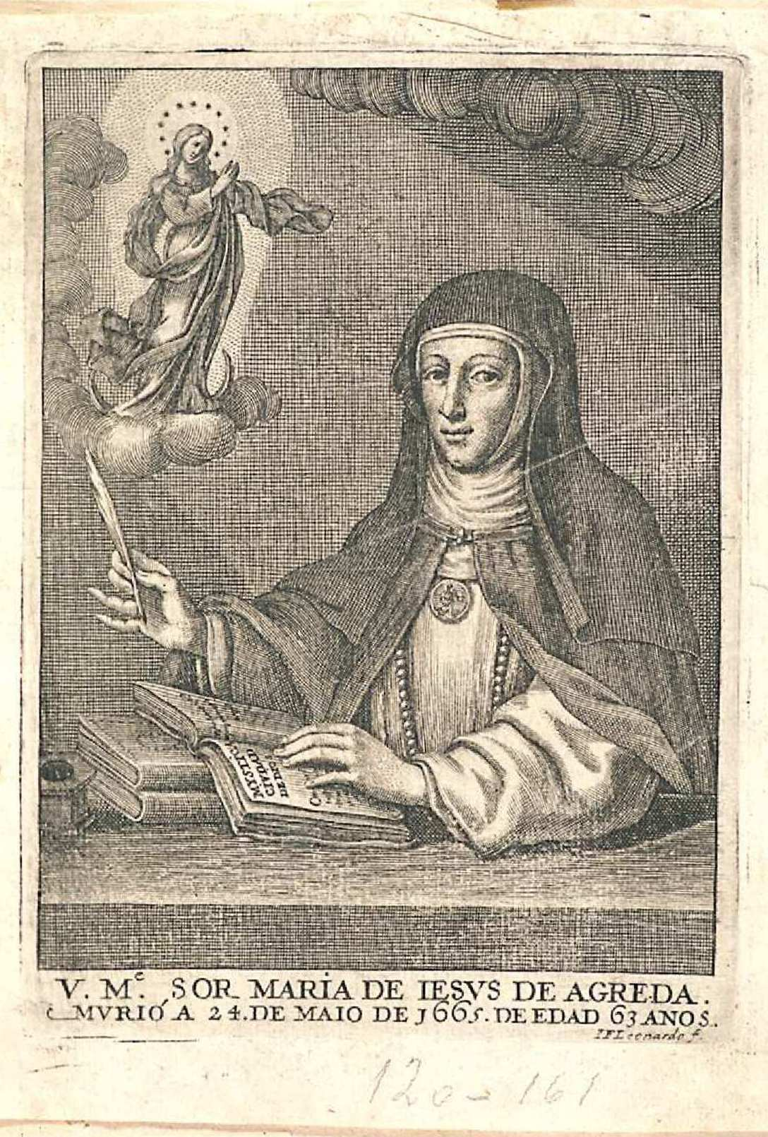 Retrato de la venerable madre sor María de Jesús Ágreda, grabado firmado I. F. Leonardo sobre dibujo de Hendrick Verbruggen ilustración de la Mística Ciudad de Dios de la abadesa de Ágreda impreso en Madrid en 1688